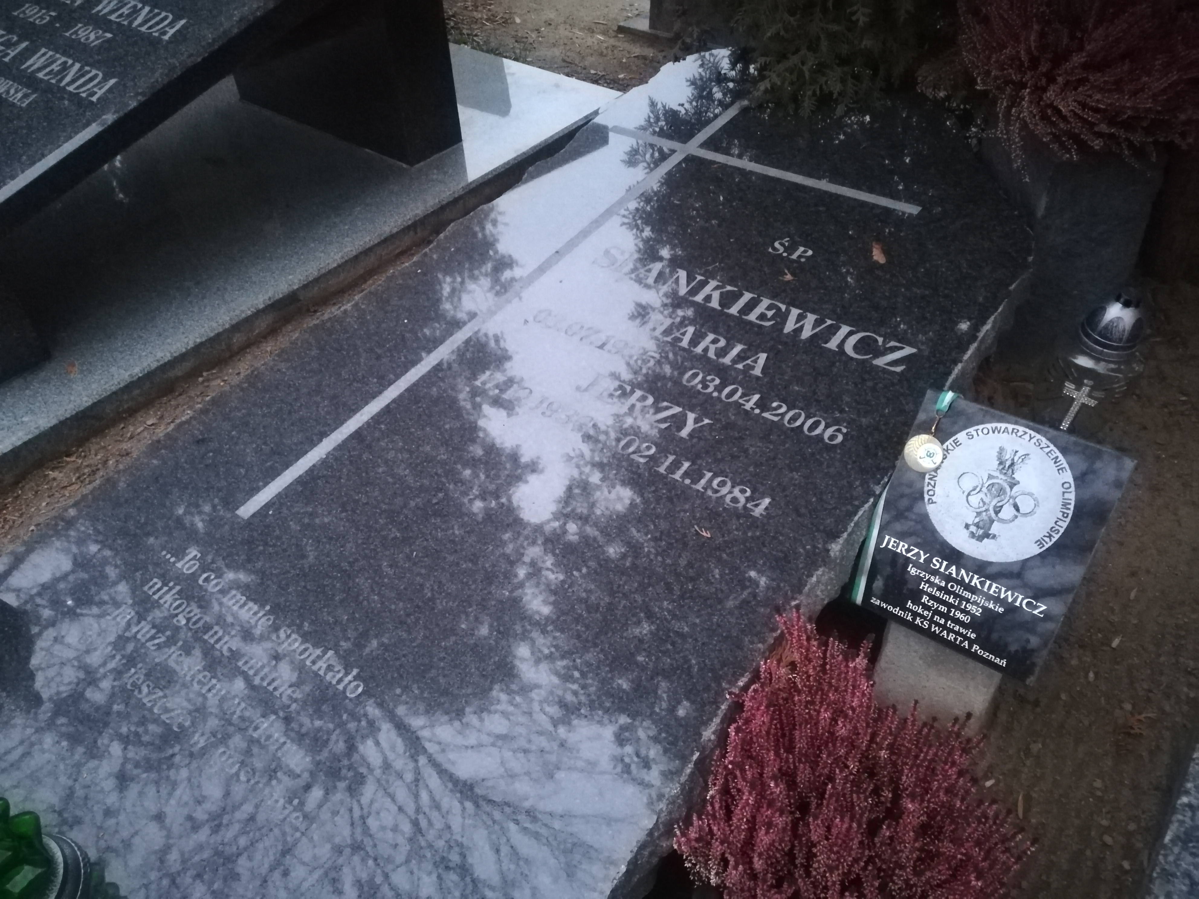 Grób Jerzego Siankiewicza na cmentarzu górczyńskim w Poznaniu.